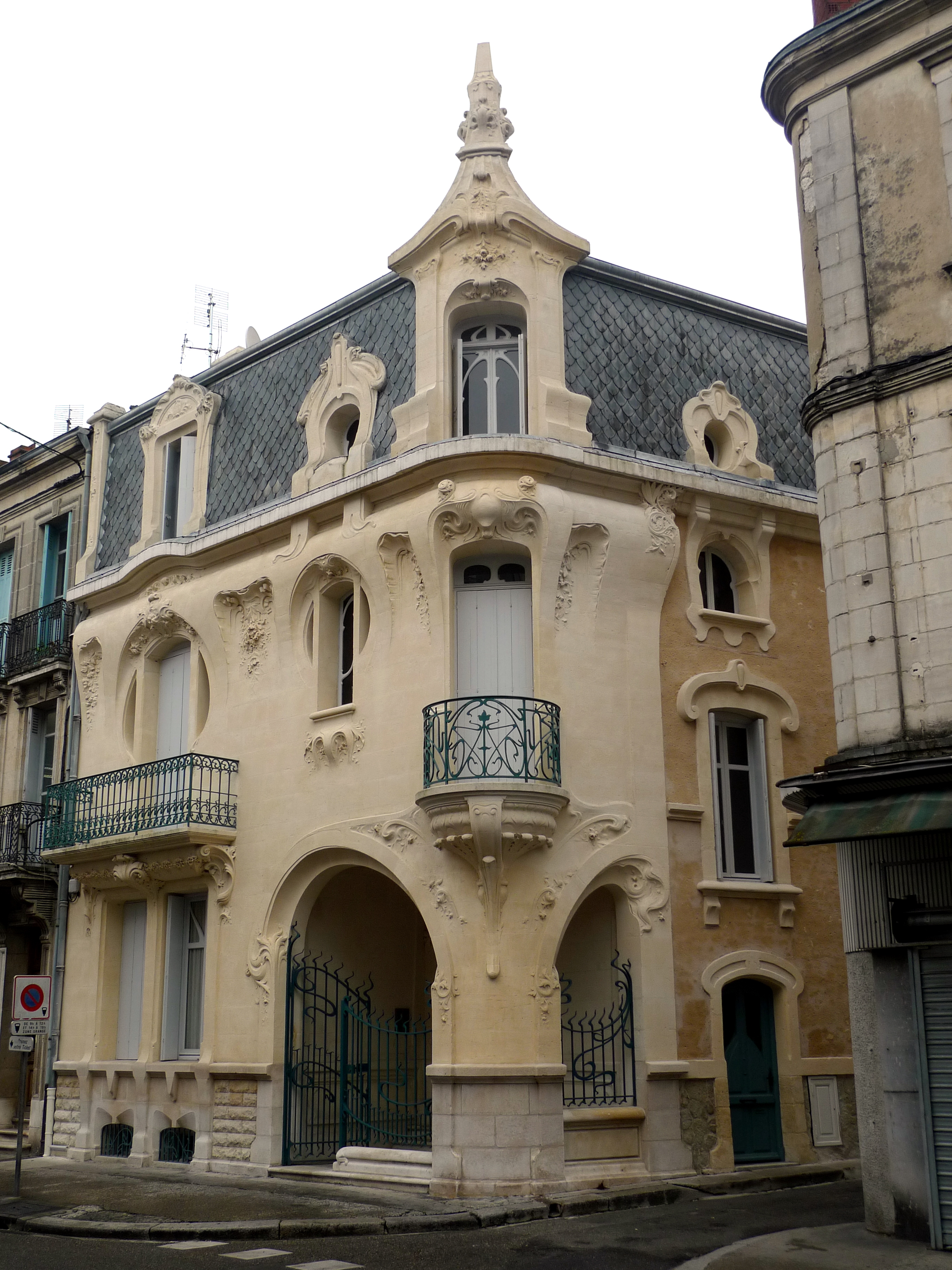 Maison Art Nouveau: 56 boulevard President Carnot, Agen